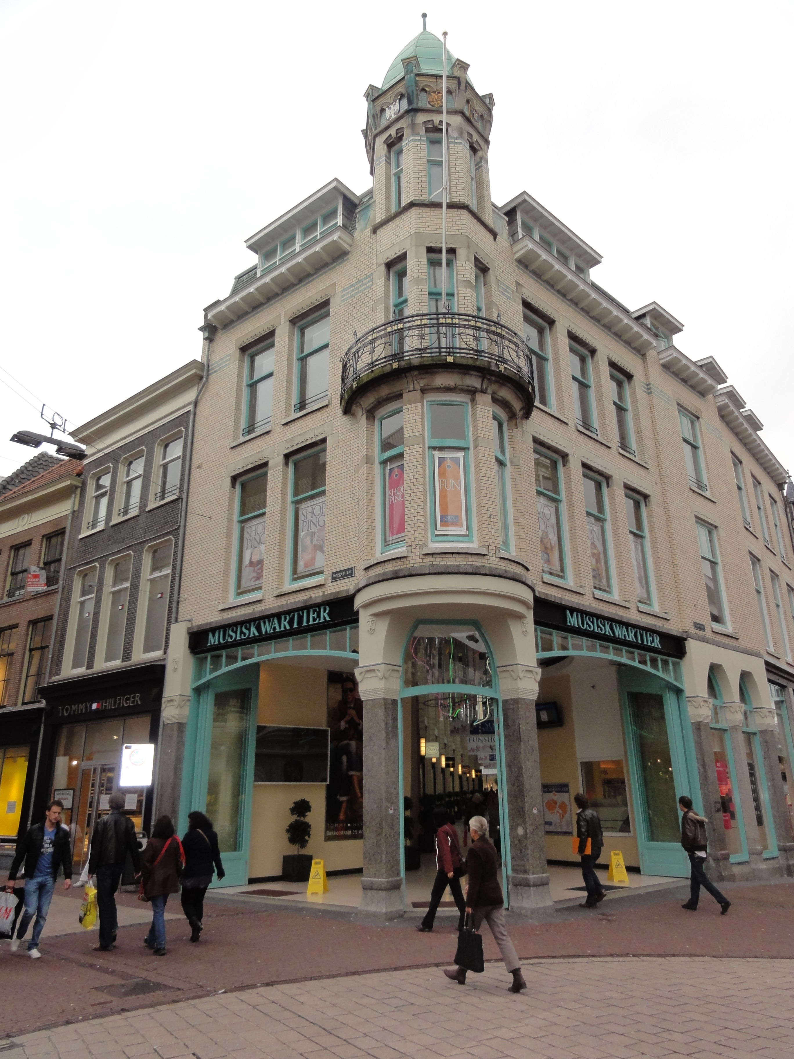 Arnhem Rijksmonument 516832 (in Art Nouveau stijl Roggestraat 43, entree Musiskwartier